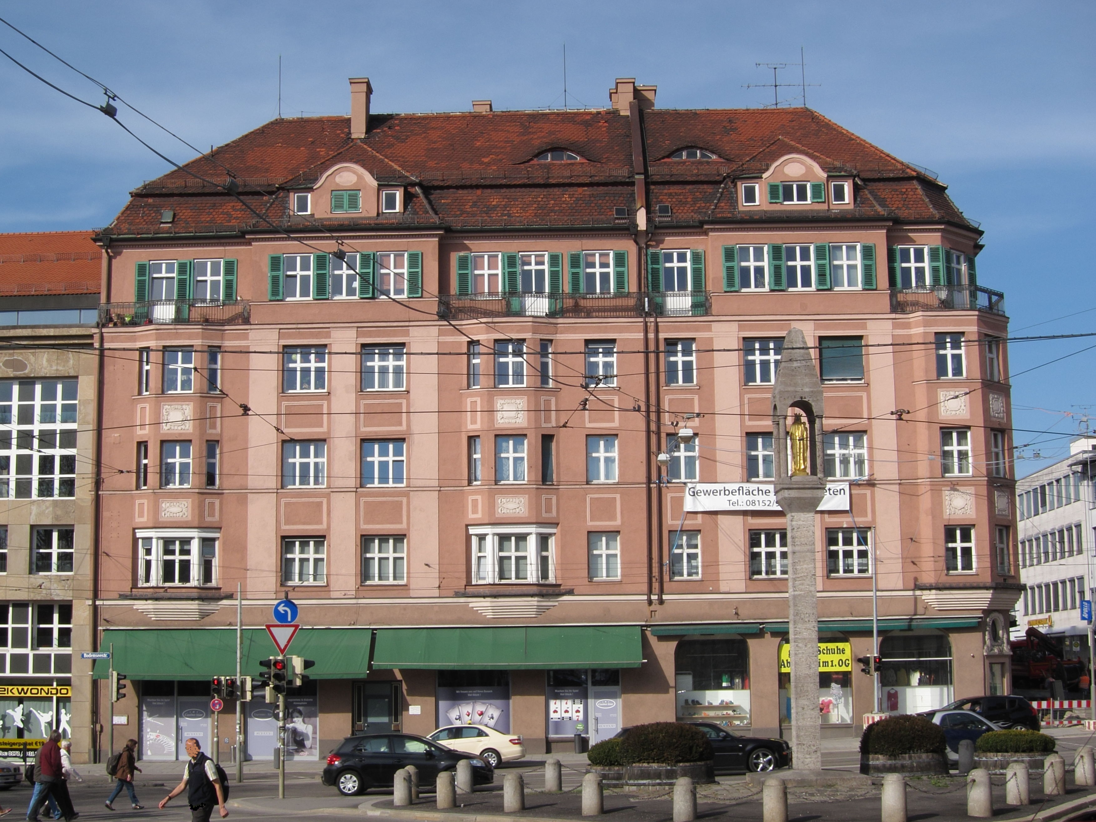 Bodenseestraße 2; Wohn- und Geschäftshaus, klassizistischer Jugendstil, 1911–12 von Eduard Lotterschmid; Einheit mit Gleichmannstraße 1.